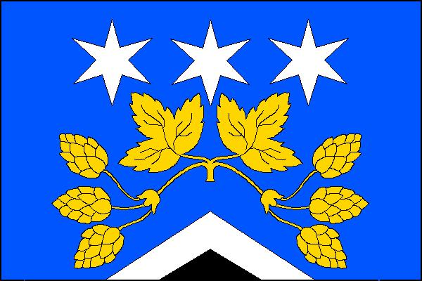 Vlajka obce Tuchořice